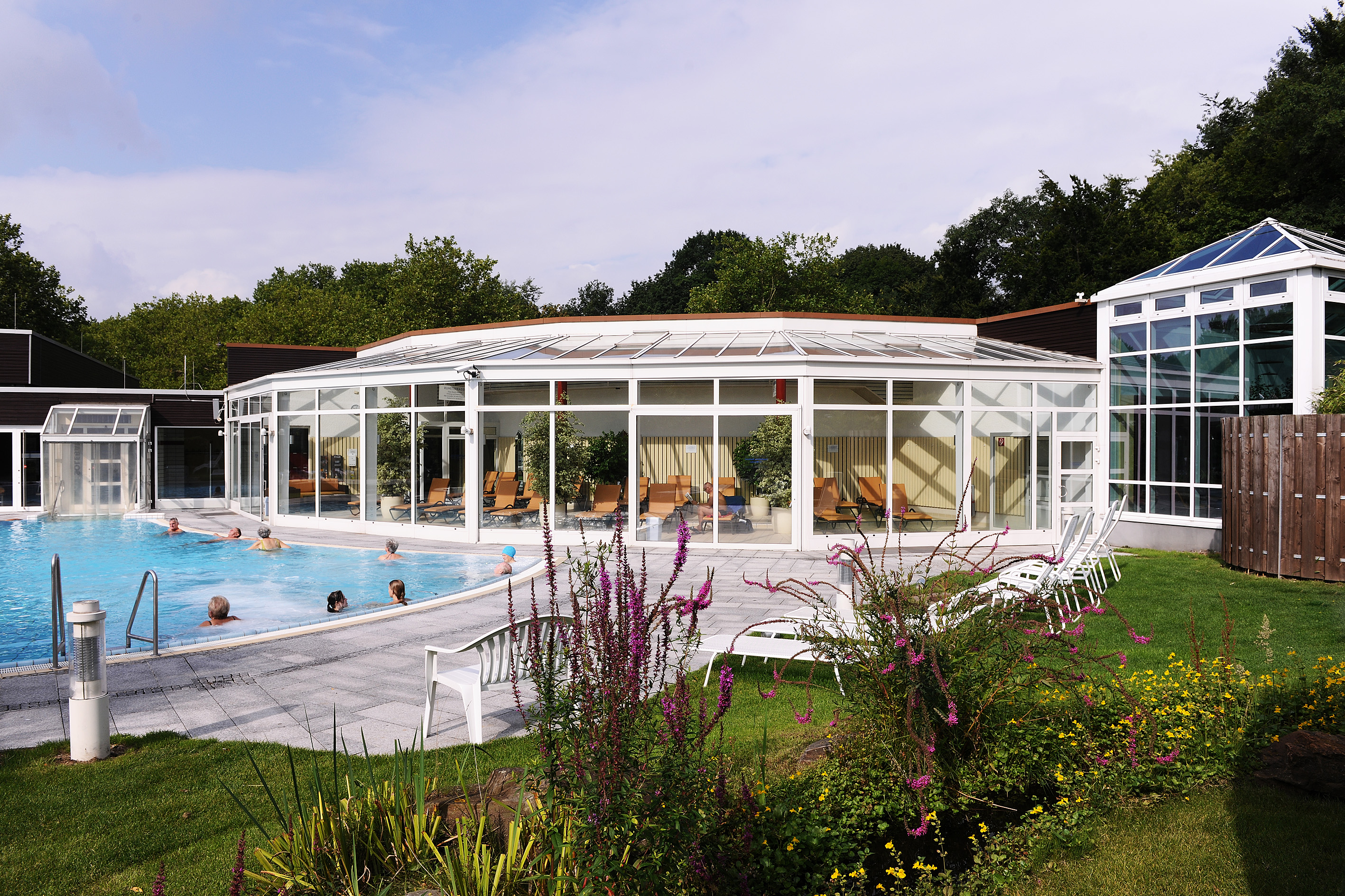 Das Soleaußenbecken im Gesundheitspark Nienhausen